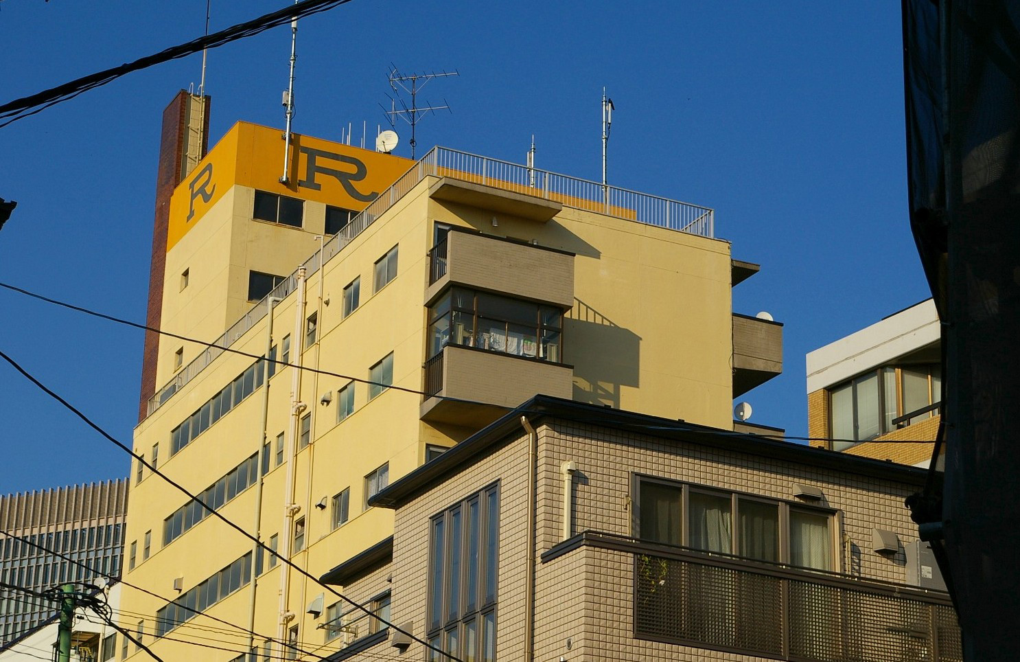 Ich machte dieses Foto von mir in 2006.